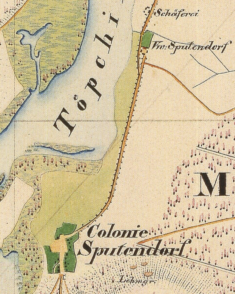 Waldeck (früher Sputendorf, Sputenberge), Gemeindeteil von Töpchin, Ortsteil der Stadt Mittenwalde, Lkr. Dahme-Spreewald, Brandenburg, Ausschnitt aus dem Urmesstischblatt 3847 Teupitz von 1841